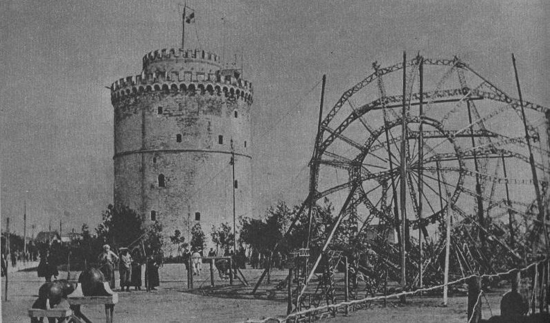 le Miroir N°133 page 6 carcasse de Zepplin devans la Tour Blanche